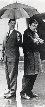 Reino Helismaa and Pentti Saarikoski in 1962. (First published in Suosikki 5/1962.)